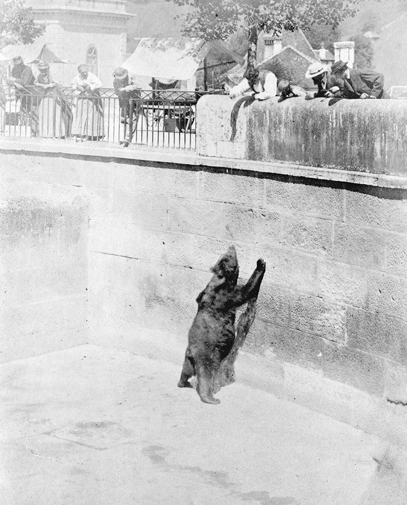 Photographie de la fosse aux ours situé dans un ancien zoo du XIXème siècle à Berne